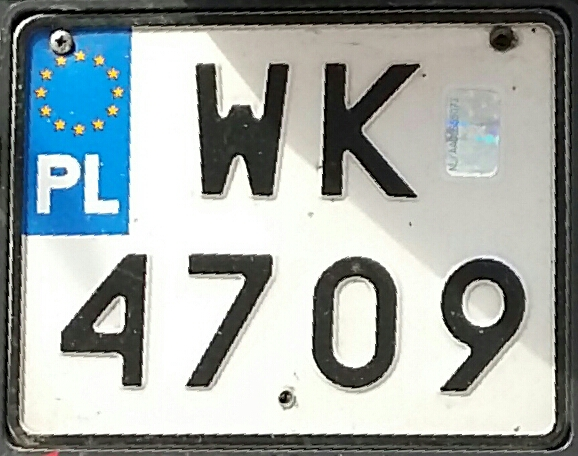 Tablica rejestracyjna dla motocykla.